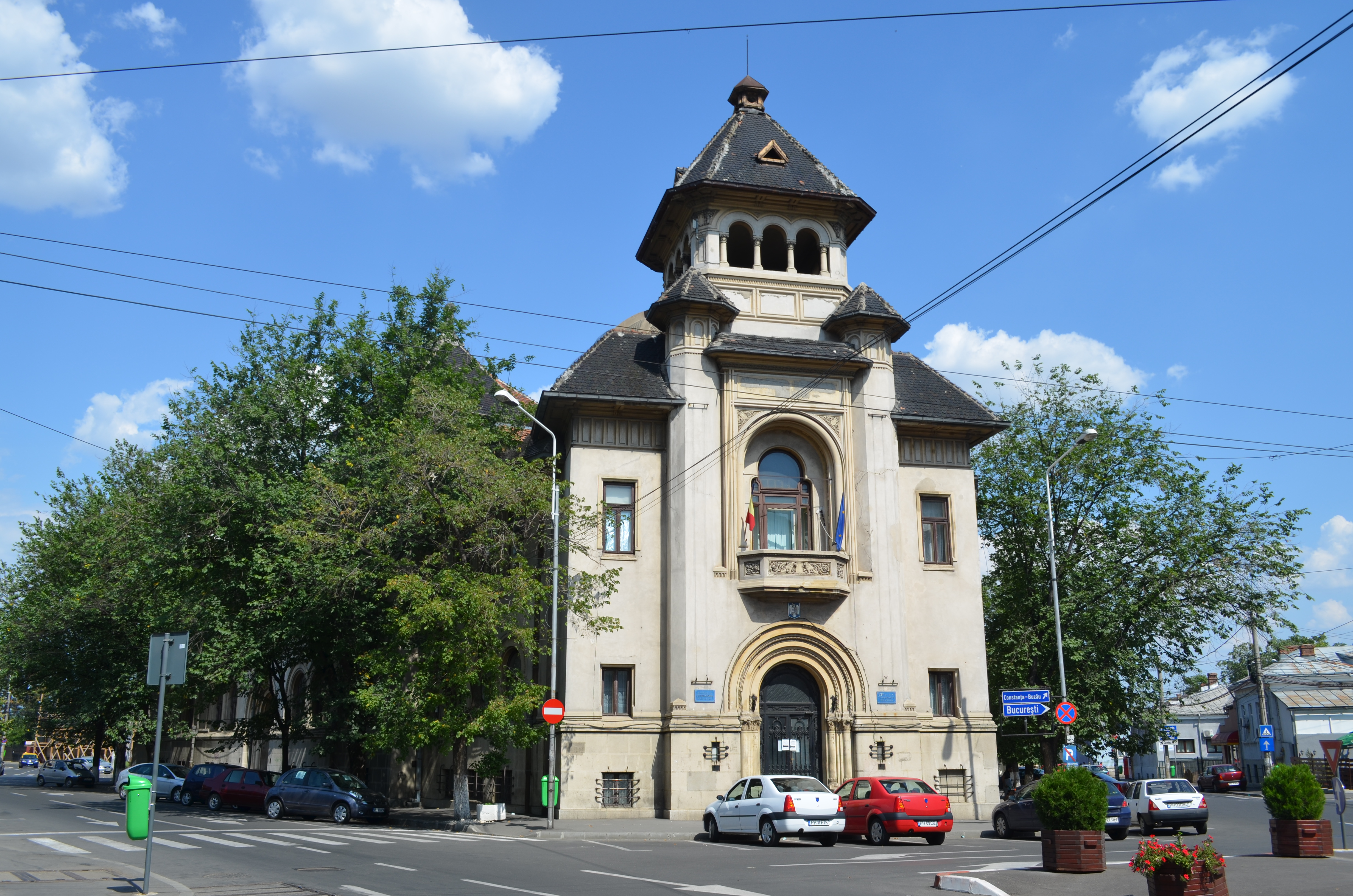 Tribunalul Județean Prahova